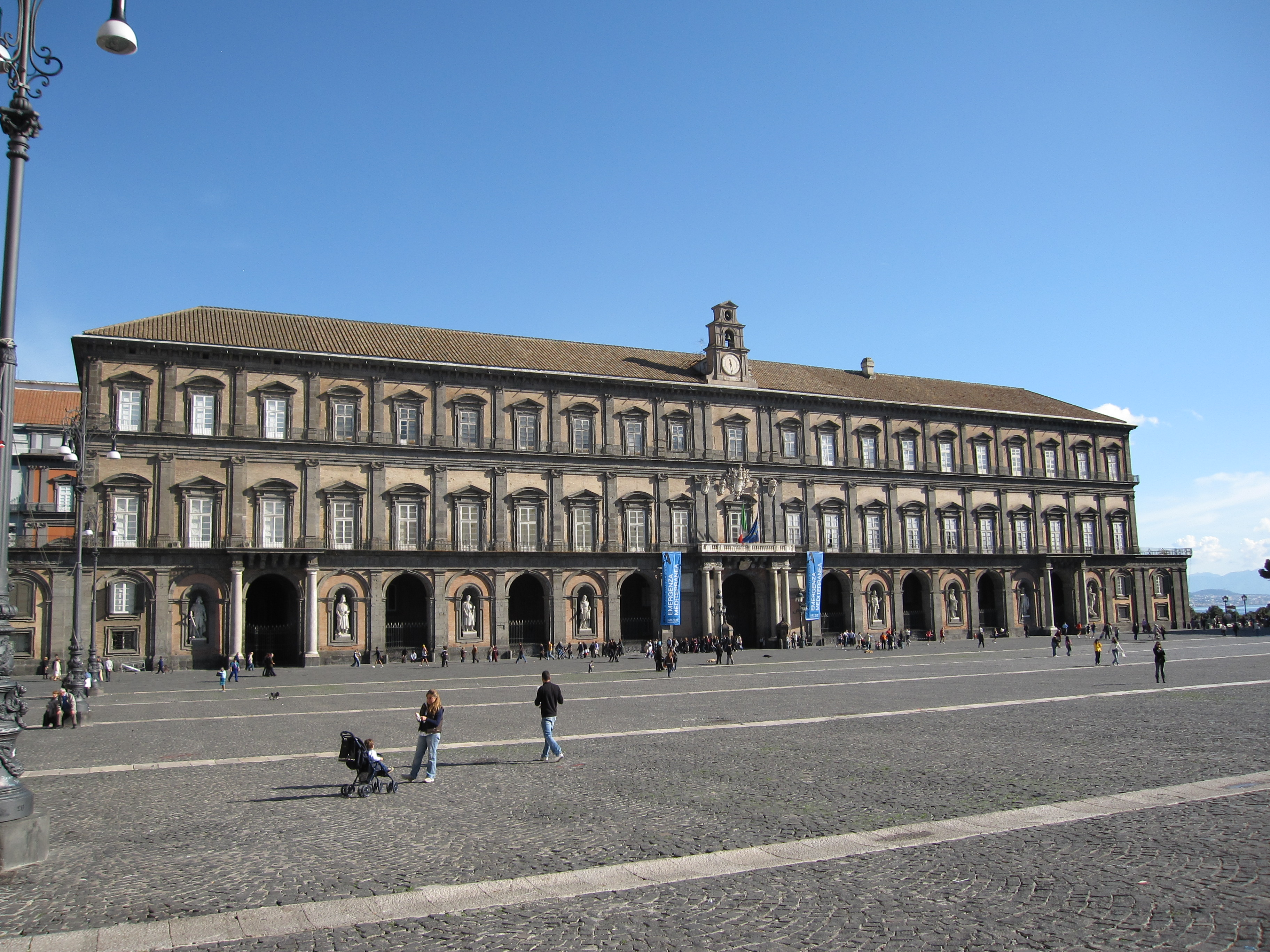 La monumentale facciata su Piazza del Plebiscito